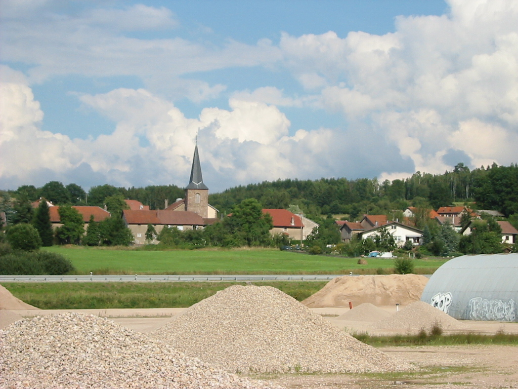 La Voivre, commune des Vosges. Au premier plan, ballastière puis déviation de la RN 59.